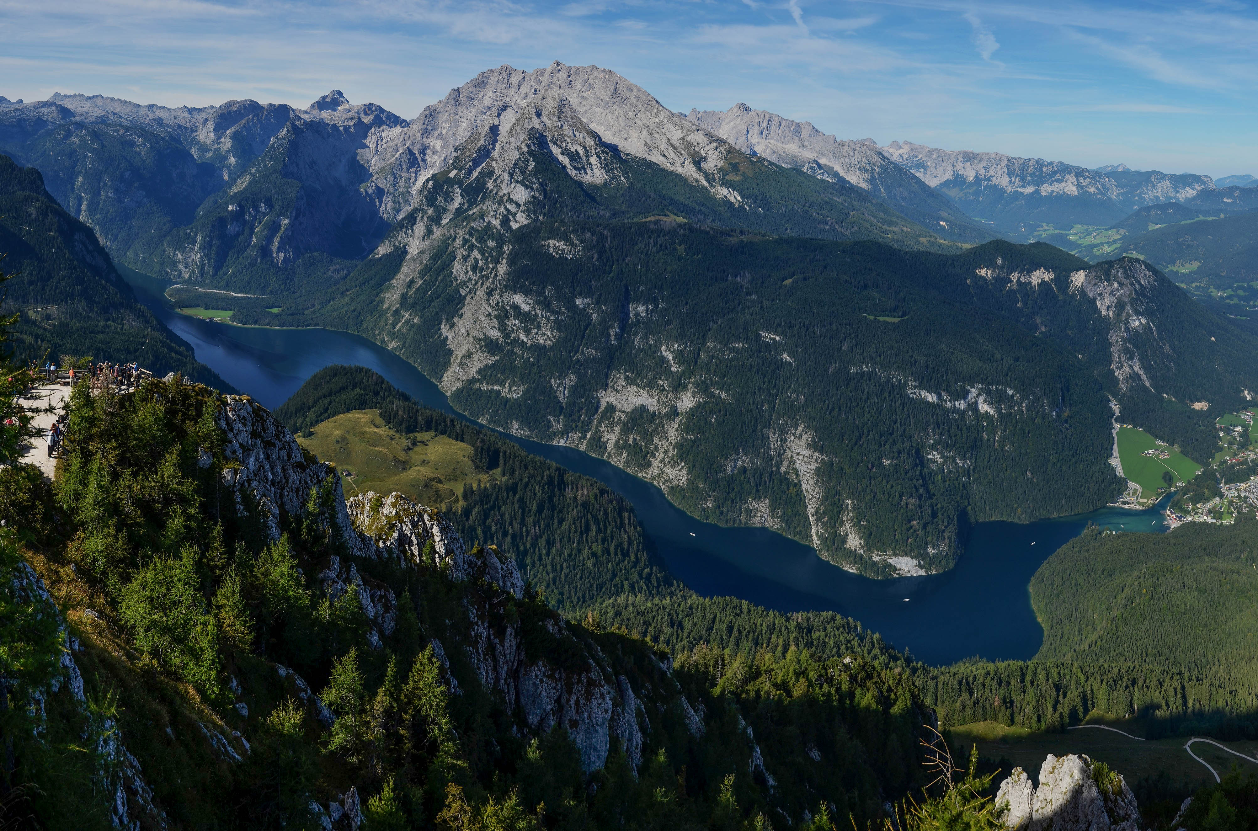 Watzmann a jezero Königsee z vyhlídky u Jenner